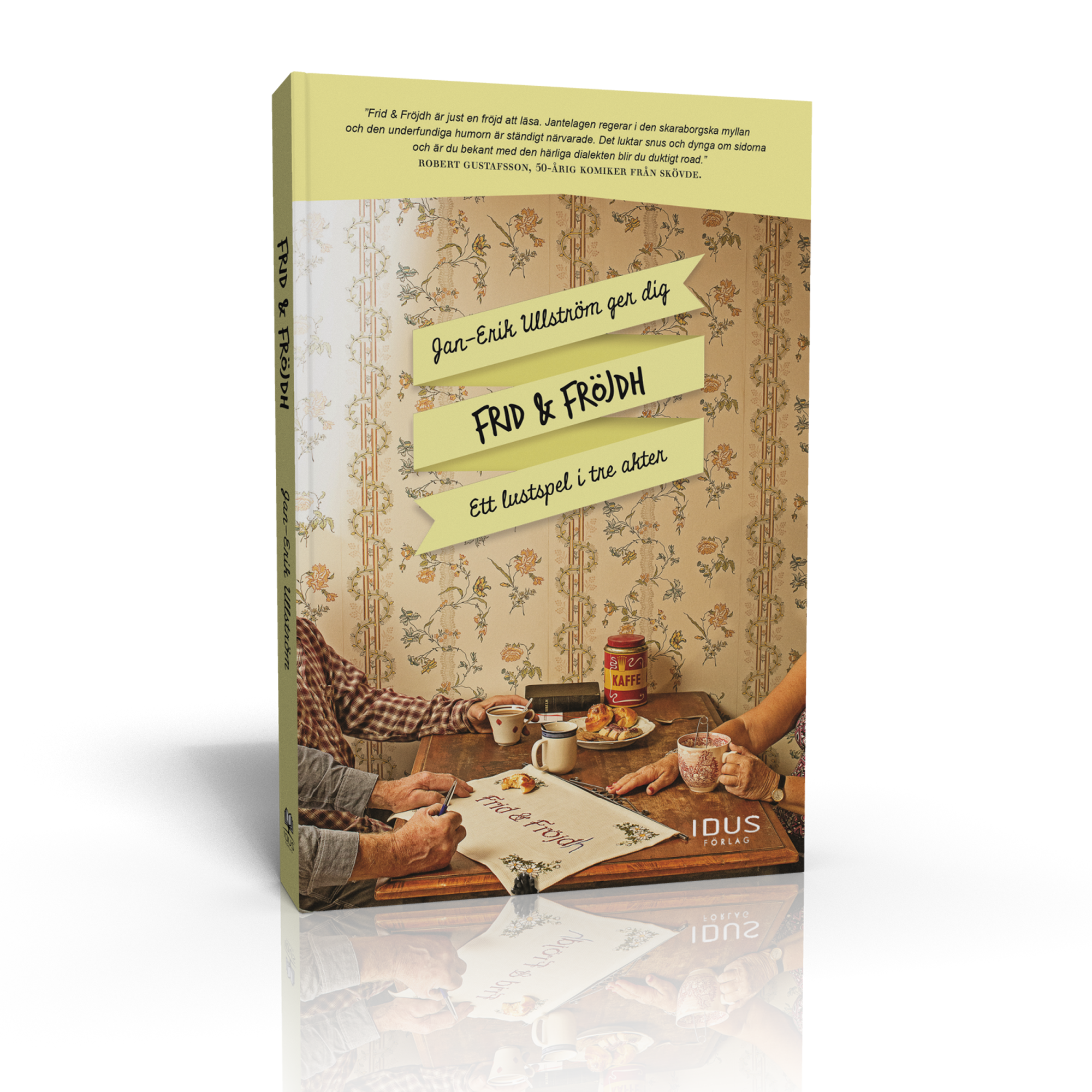 Frid & Fröjdh, Idus förlag. 2014. Foto: Tuana Art. Omslag: Sandra Stridh Mossberg. Koncept: Jan-Erik Ullström